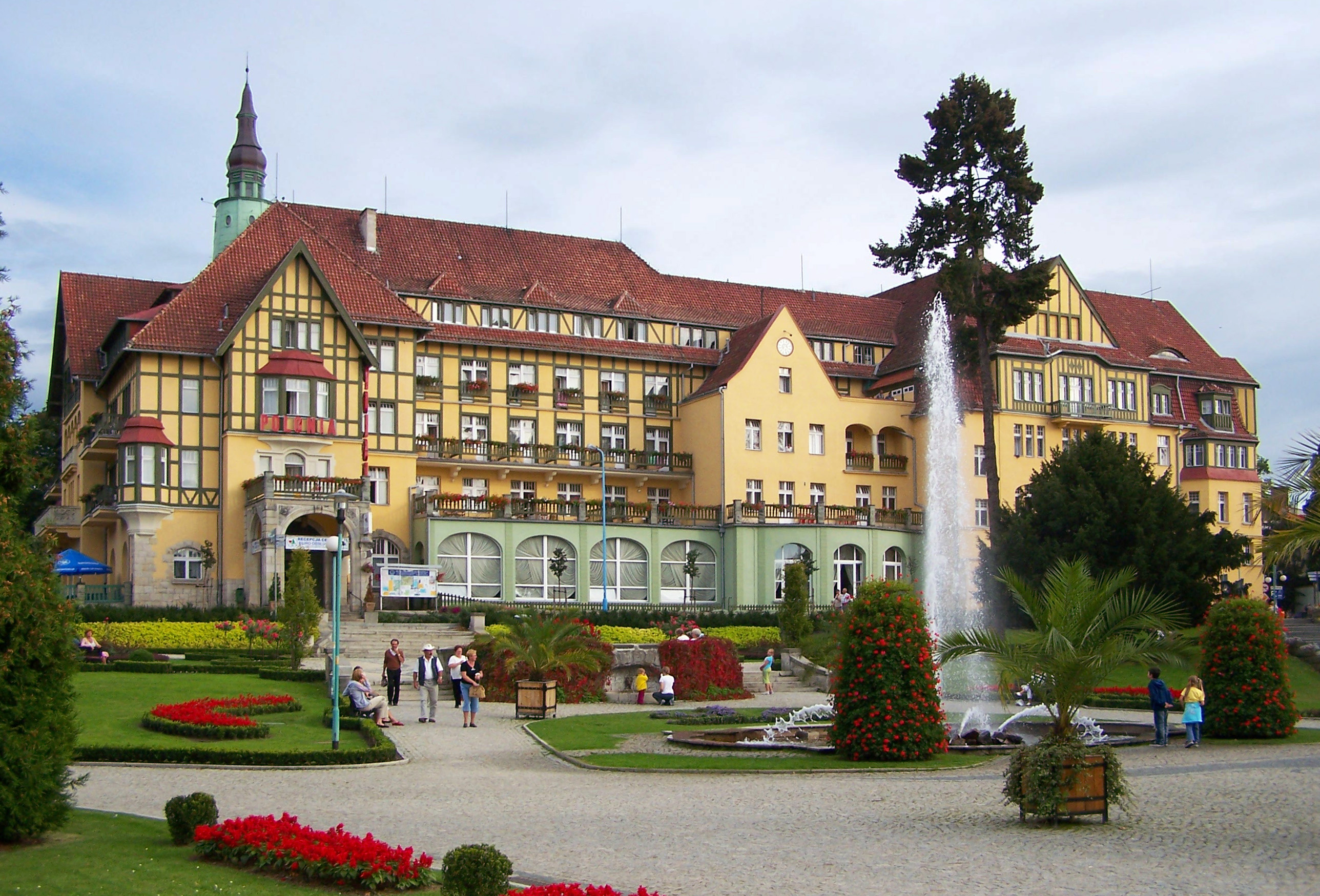 Sanatorium "Polonia" w Kudowie-Zdroju.